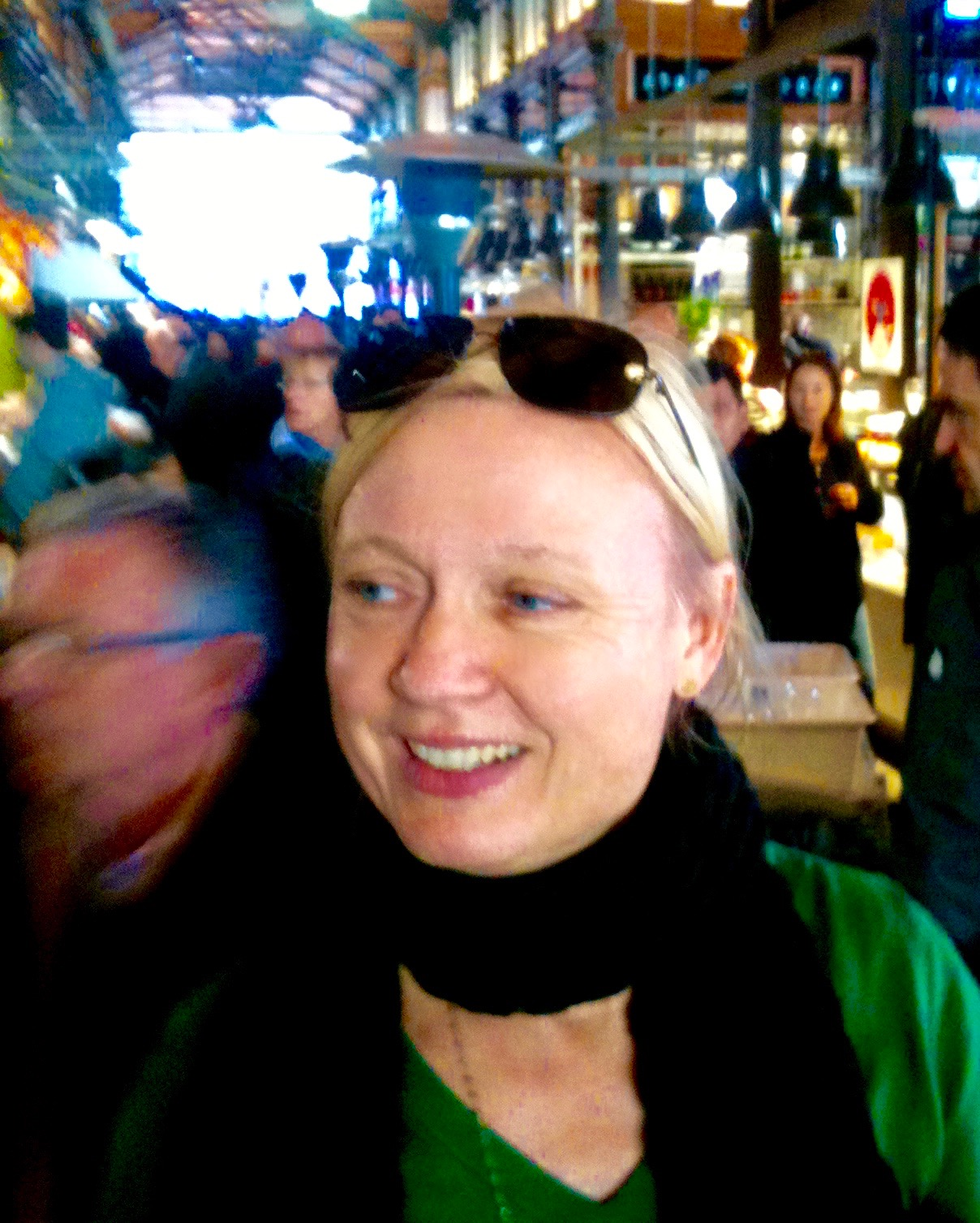 Petra Höfer, Dezember 2016, Madrid